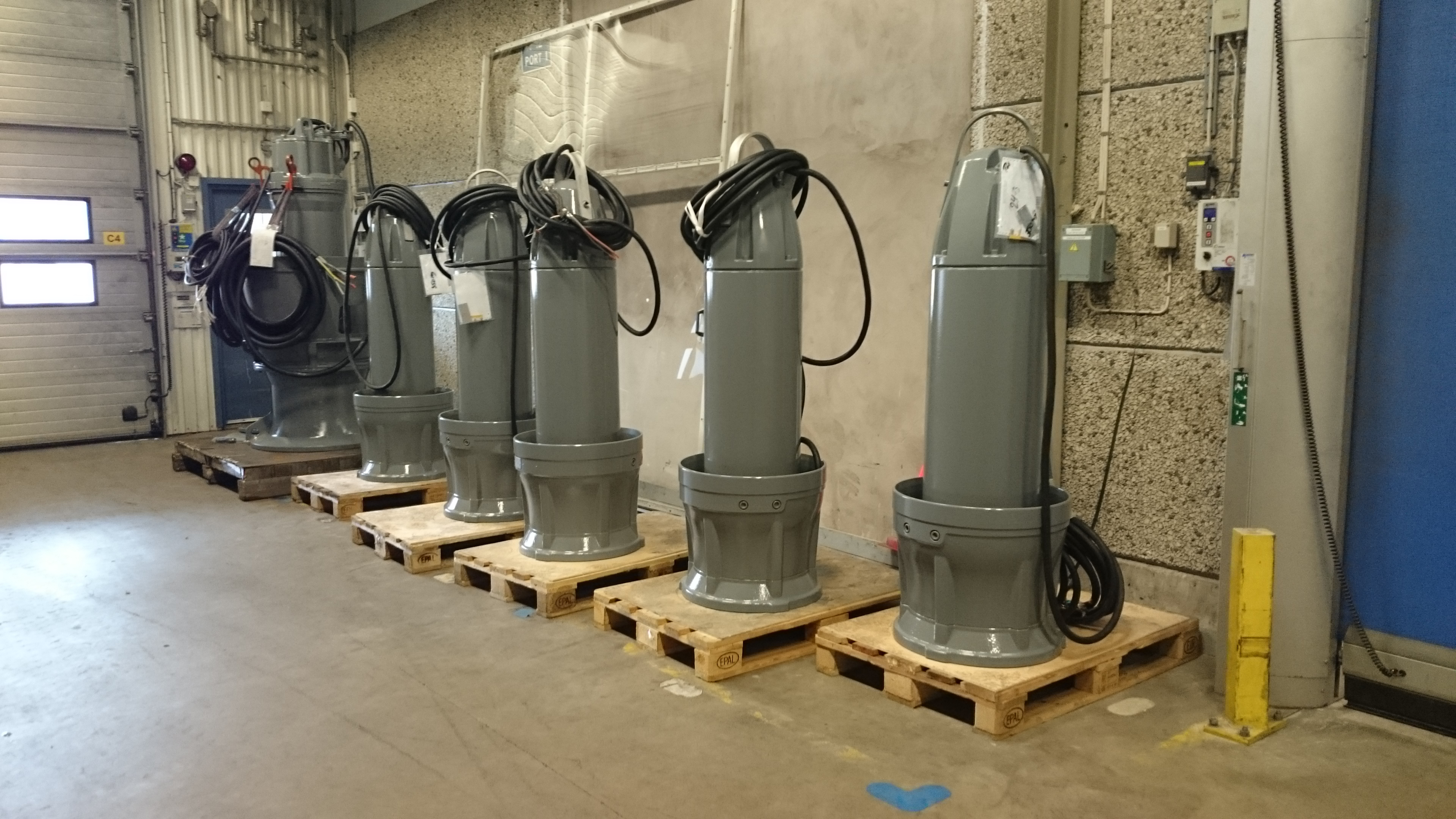 Flygt propellerpumpar som väntar på provkörning innan leverans